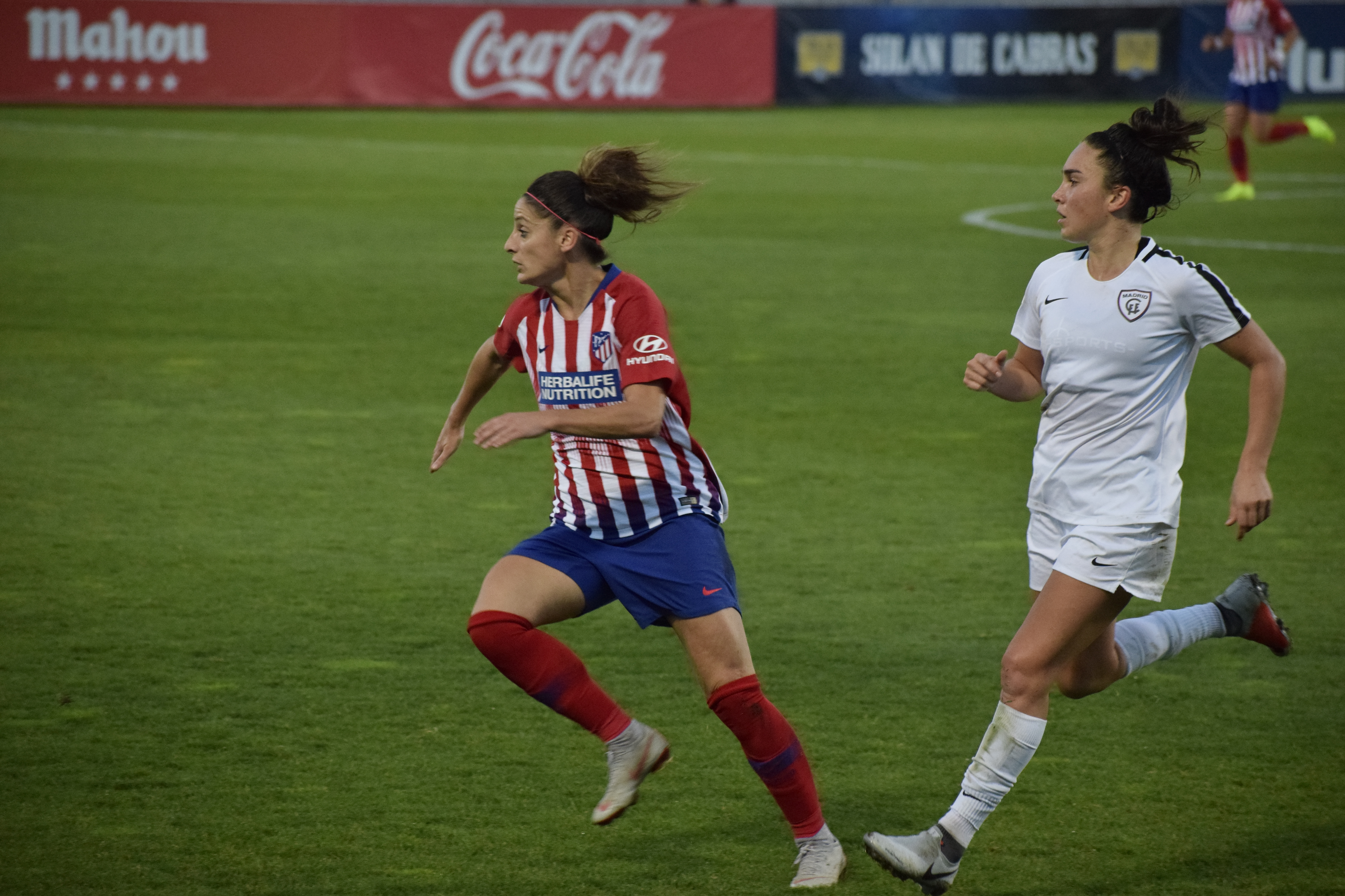 Esther González jugando con el Atlético de Madrid